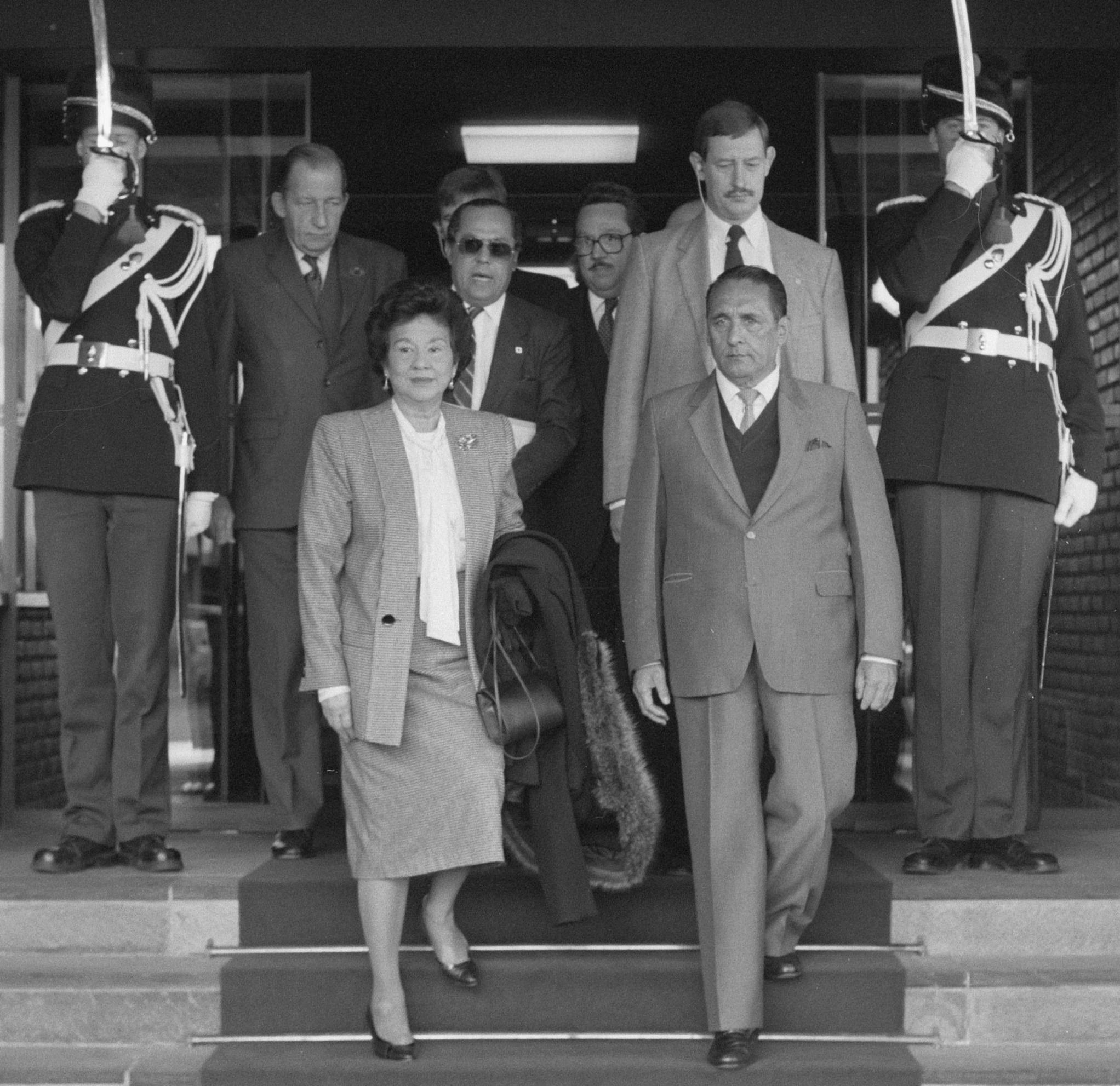 Salvadoraanse president Duarte bezoekt ons land; president Duarte langs erewacht